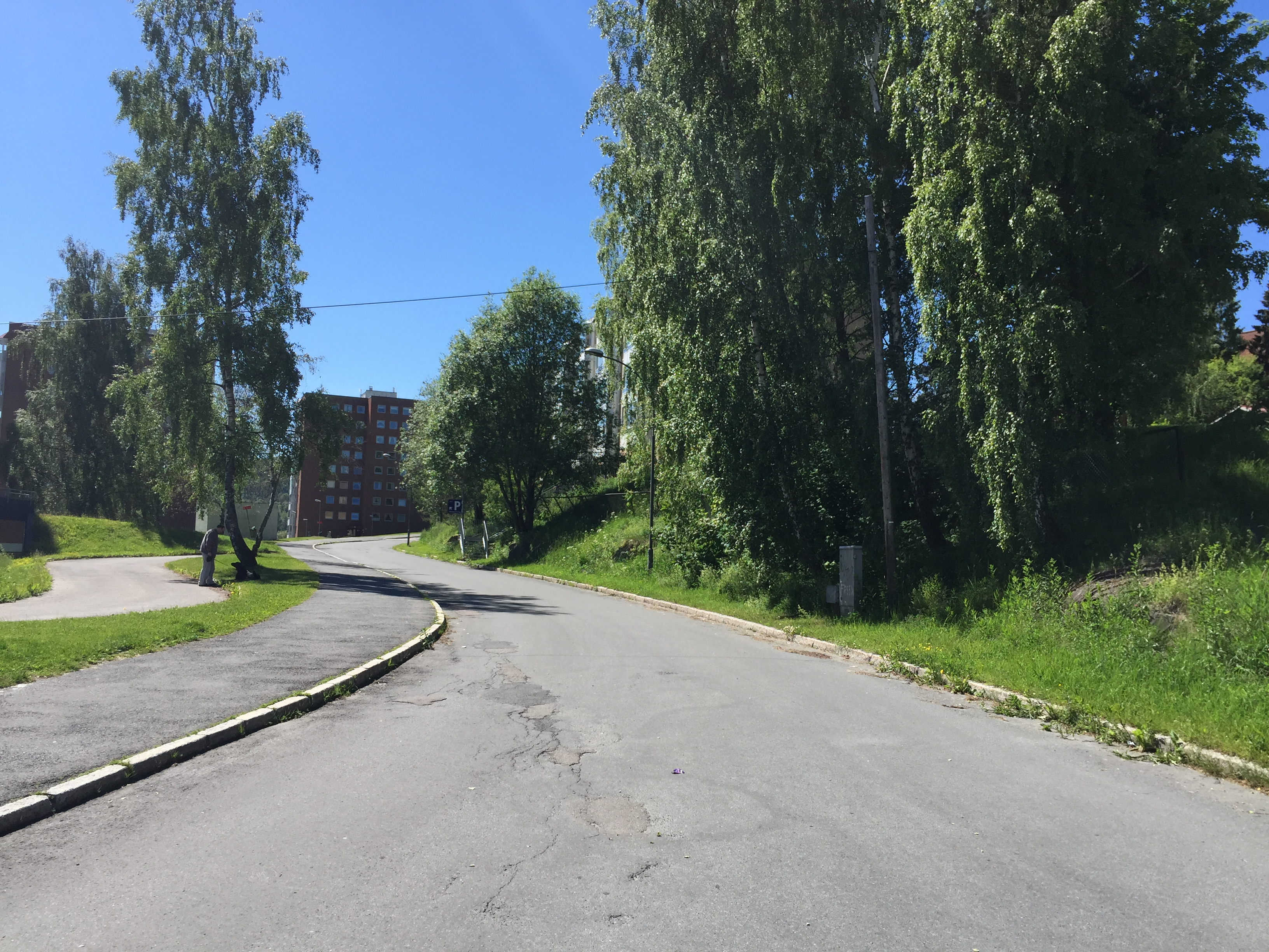 Ludvig Karstens vei i Oslo.